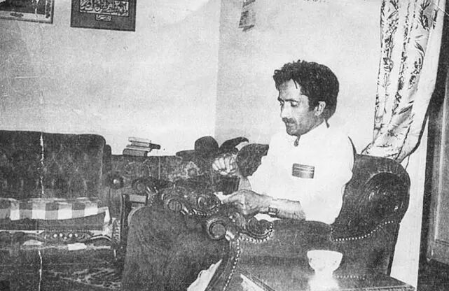 Cahit ZARİFOĞLU